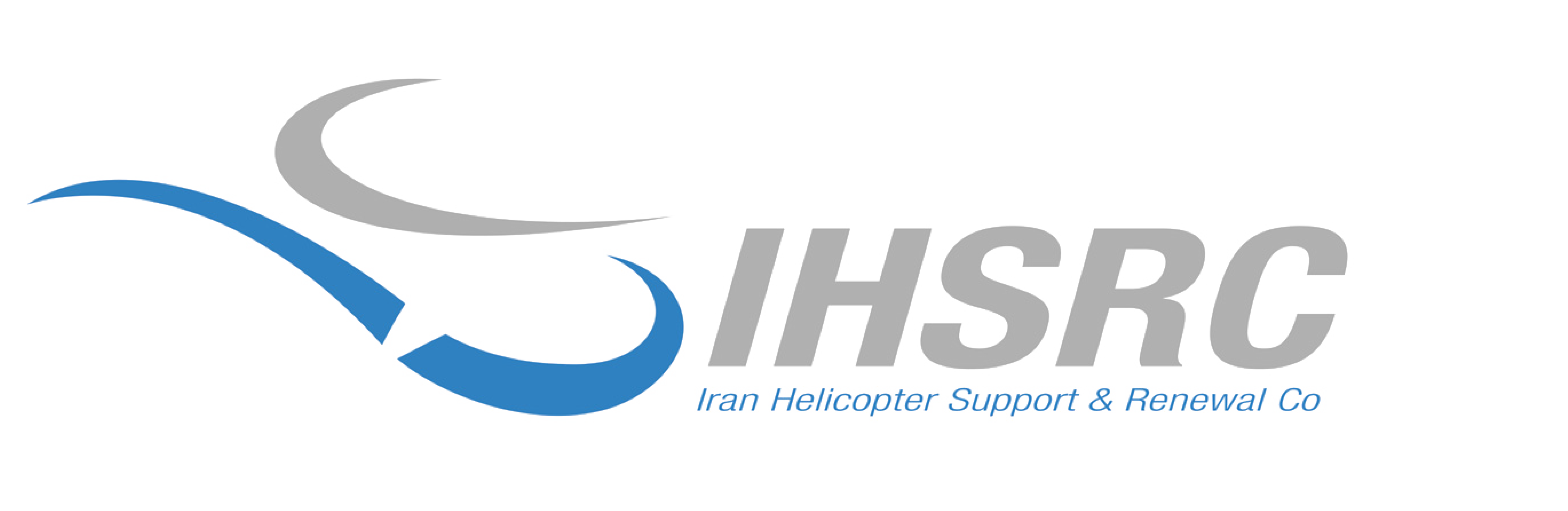 لوگوی جدید شرکت پشتیبانی و نوسازی هلیکوپترهای ایران